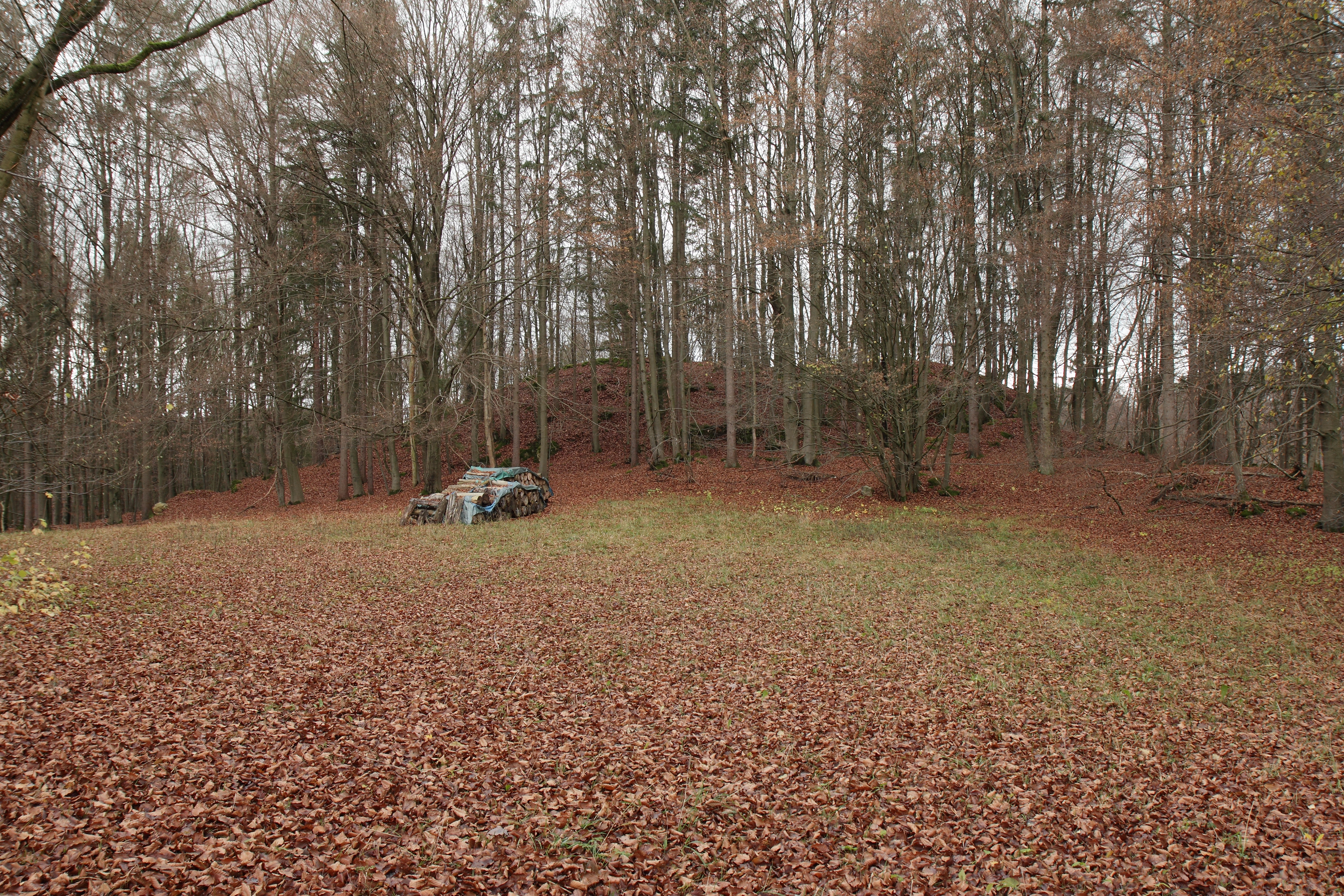 Burgstall Altes Schloss (Affalterthal) - Ansicht der Burgstelle aus östlicher Richtung